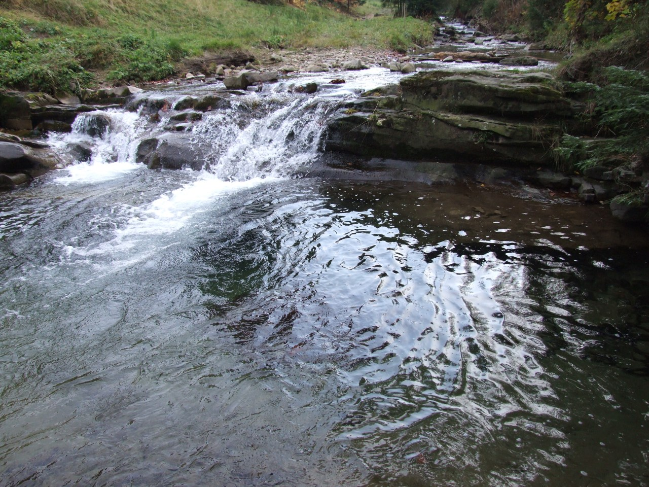 Potok Koninka w Gorcach